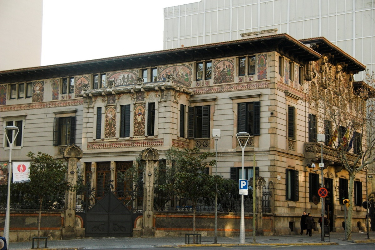 Palau Ramon Montaner (Barcelona-Catalunya), obra de Lluís Domènech i MOntaner 1899. C/.Mallorca 278. Vista general.